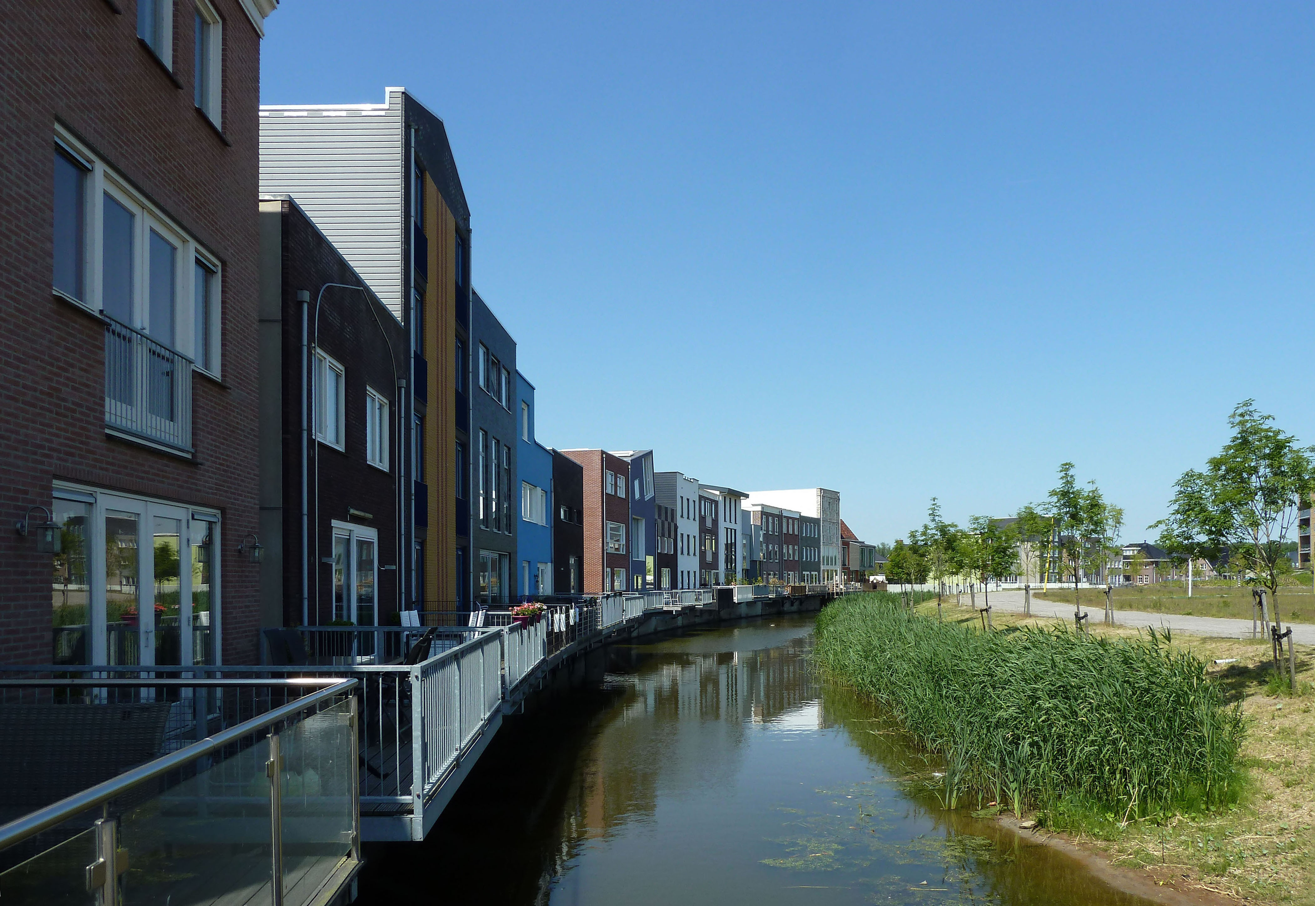 Almere, stadsdeel Almere Poort, Homeruskwartier, Aresstraat waterkant, (bewonersparticipatie 2012)